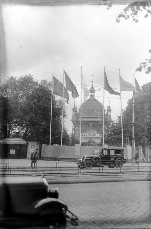 Die Eröffnung der diesjährigen großen Kunstausstellung in Berlin, auf dem Ausstellungsgelände am Lehrter Bahnhof. Blick auf das ausgeschmückte Ausstellungsgebäude.